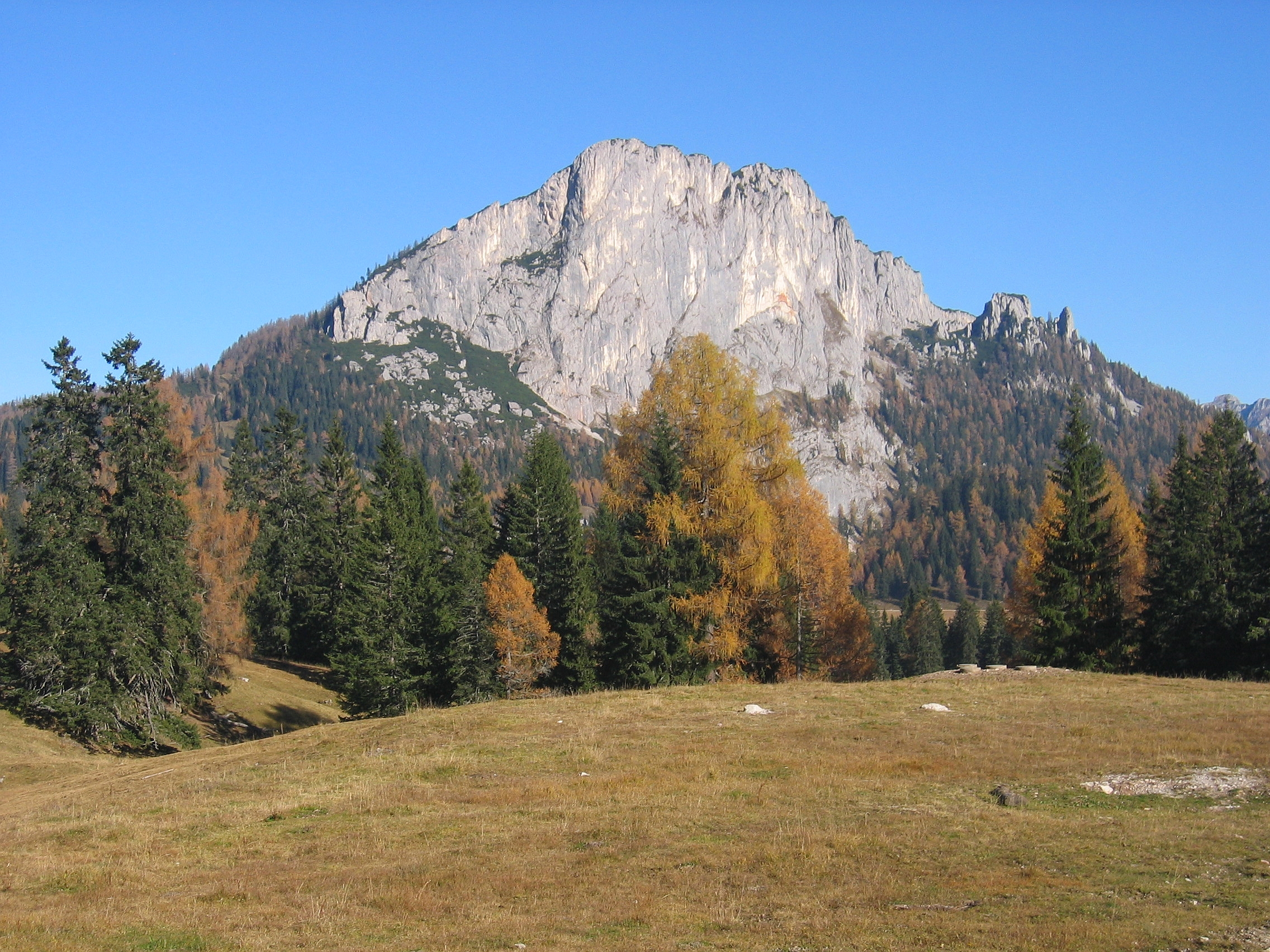 Wurzeralm, Upper Austria, Austria